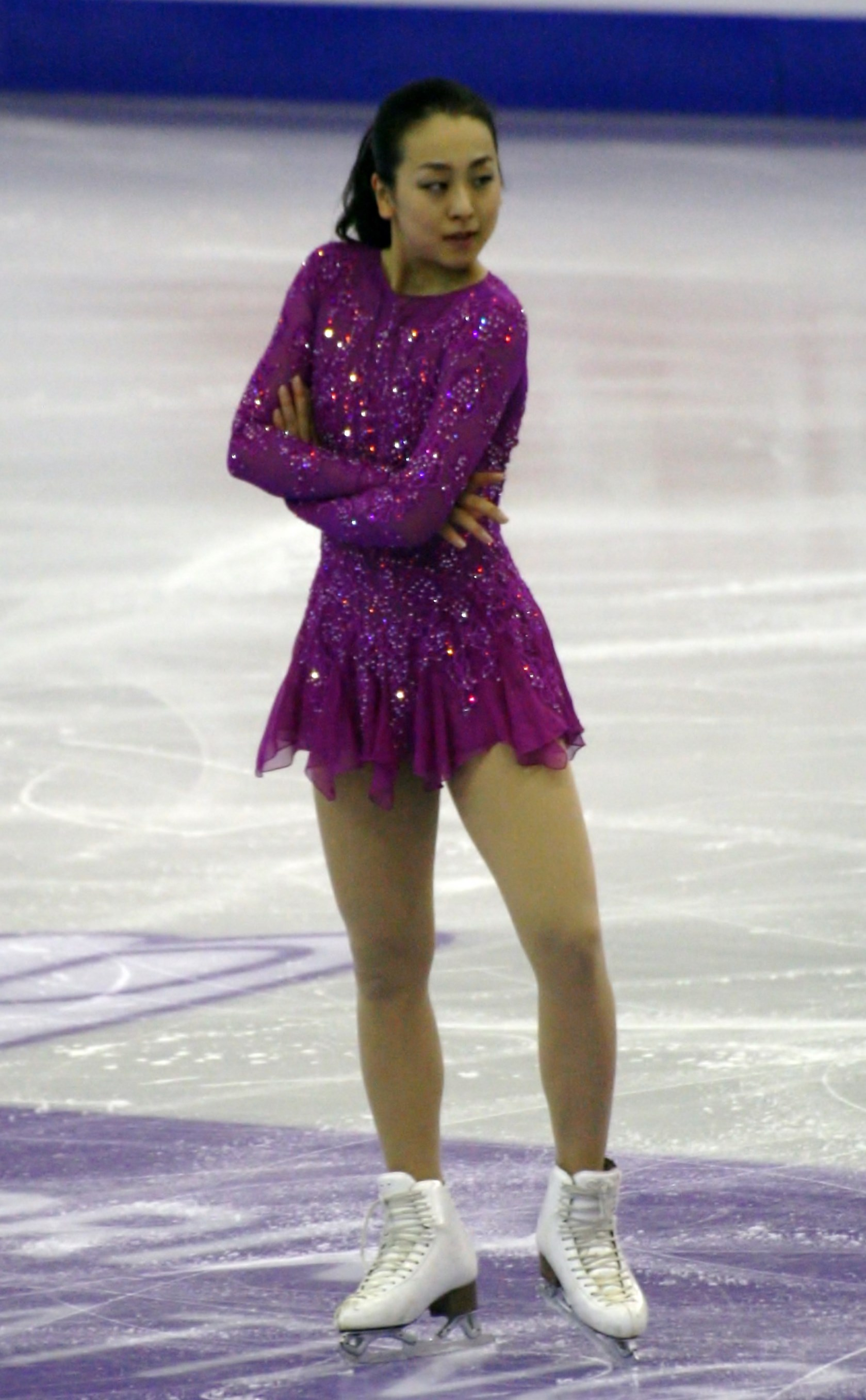 Мао Асада (Япония) на финале Гран-при по фигурному катанию 2015-2016.